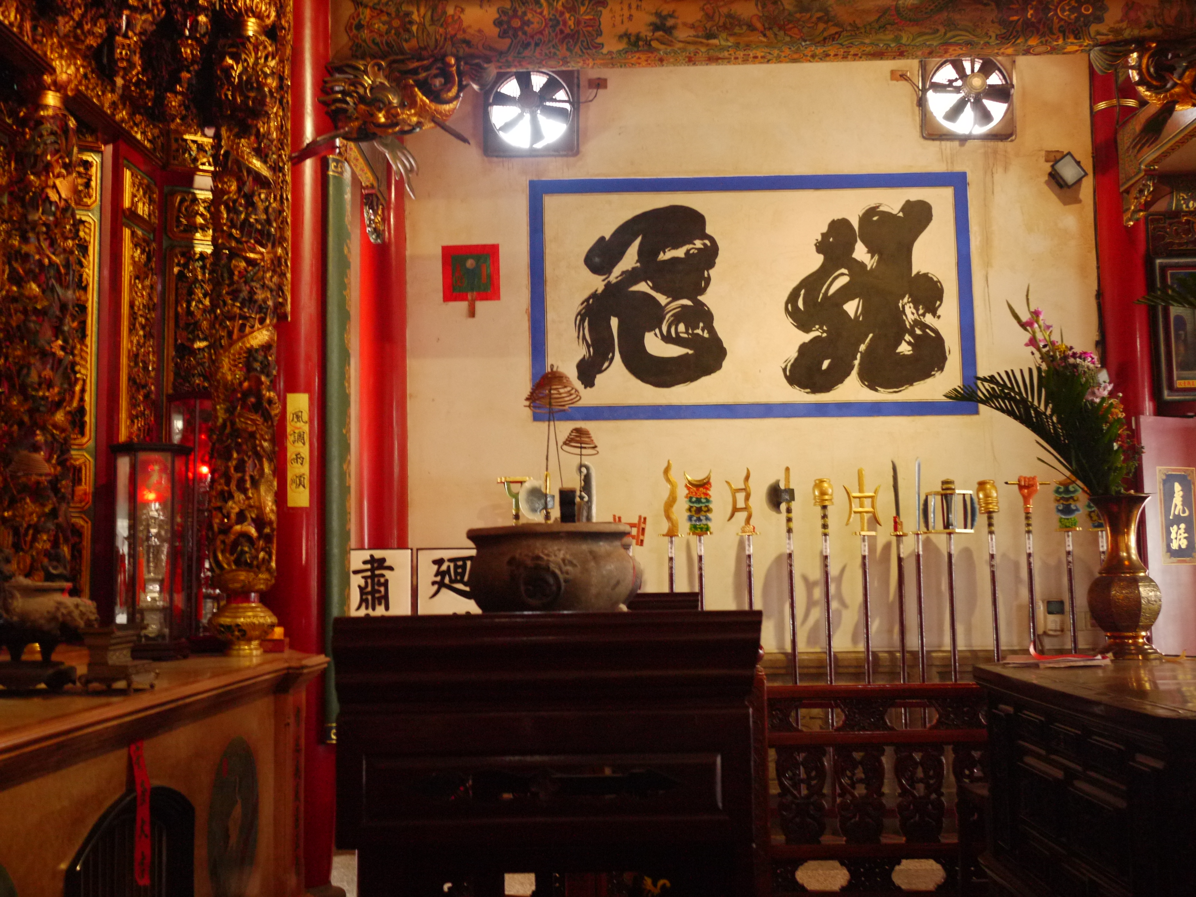 台南市學甲區慈濟宮，正殿牆上龍飛狂草字樣